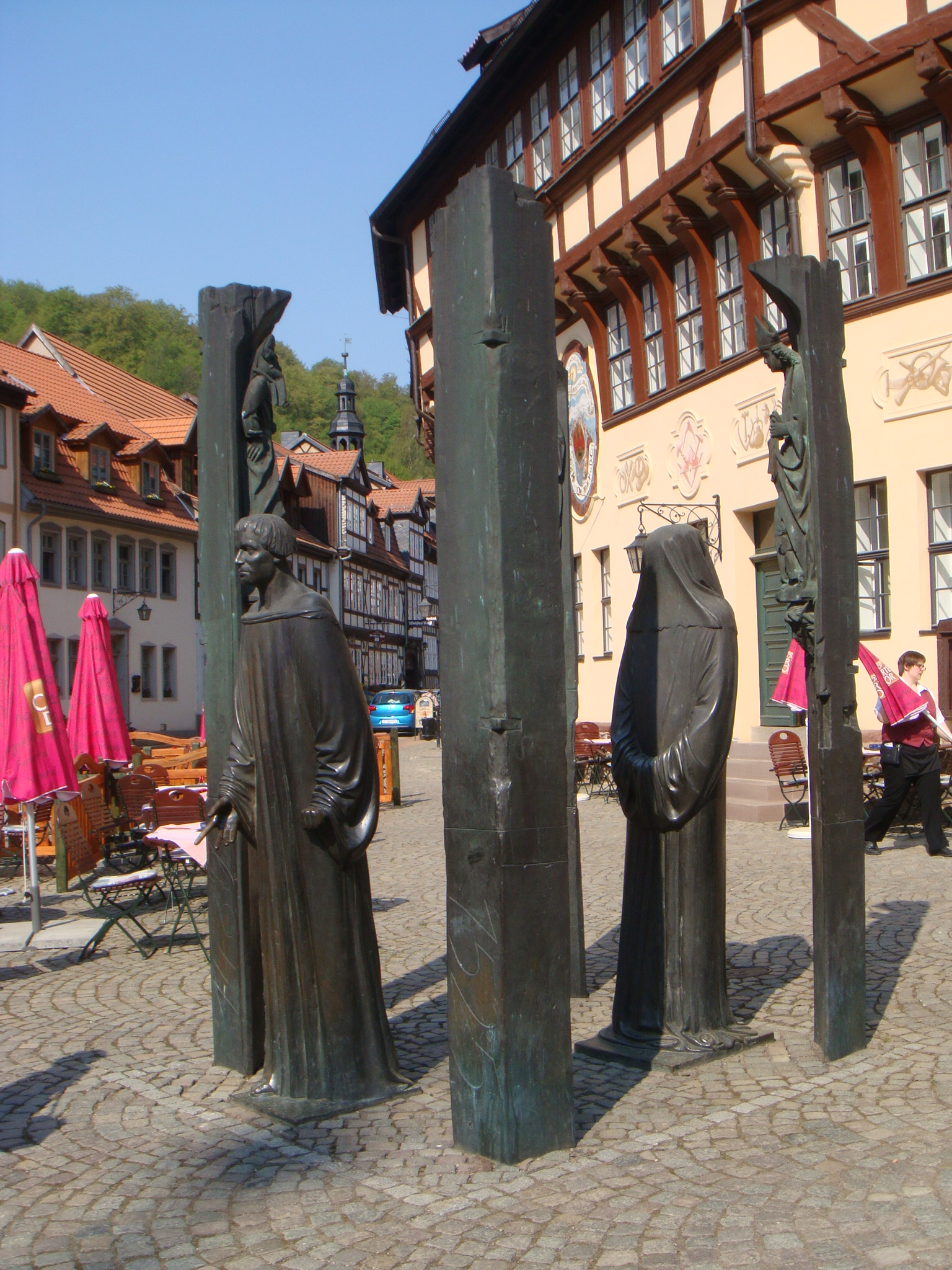 Thomas-Müntzer-Denkmal von Klaus Friedrich Messerschmidt 1989